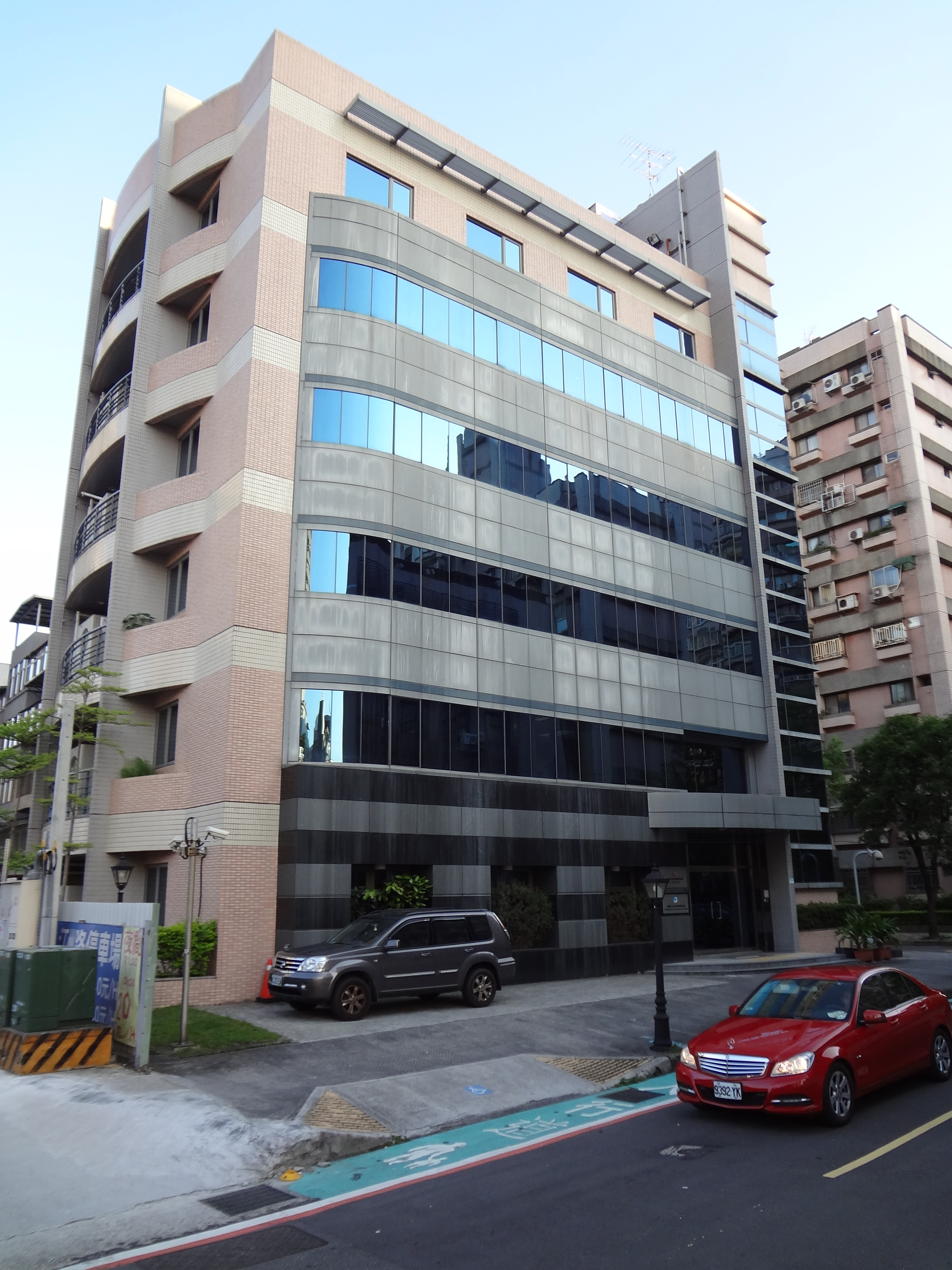 兩岸交流遠景基金會與亞太和平研究基金會總部，位於臺北市中正區汀州路三段60巷1號。